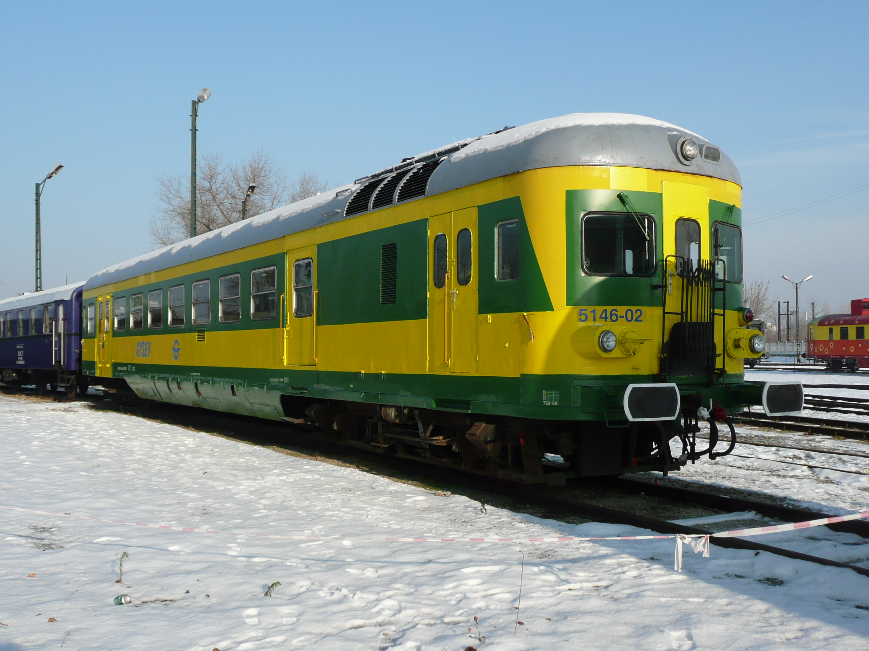 5146.02 der Gysev im Bahnpark Budapest